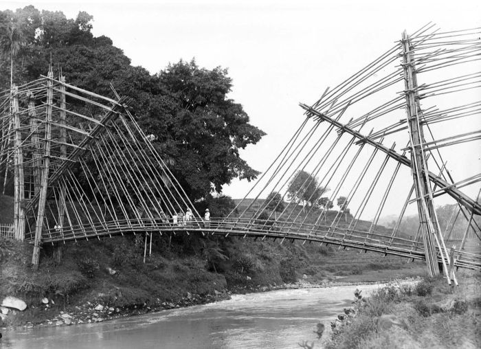 Negatif. Jembatan bambu melintasi Sungai Serayu, Wonosobo, Kedu. Bambu dapat dipakai dalam konstruksi bangunan berskala besar. Dalam foto ini tampak bagaimana jembatan bambu dapat dibangun melintasi Sungai Serayu yang lebar dengan menggunakan prinsip-prinsip konstruksi bangunan. Selain kuat, lentur, dan berdaya tahan tinggi, bambu juga murah. Setiap pemilik lahan selalu memiliki satu rumpun bambu di pekarangannya, sehingga sangat memungkinkan bahwa material ini dapat diperoleh tanpa mengeluarkan biaya.